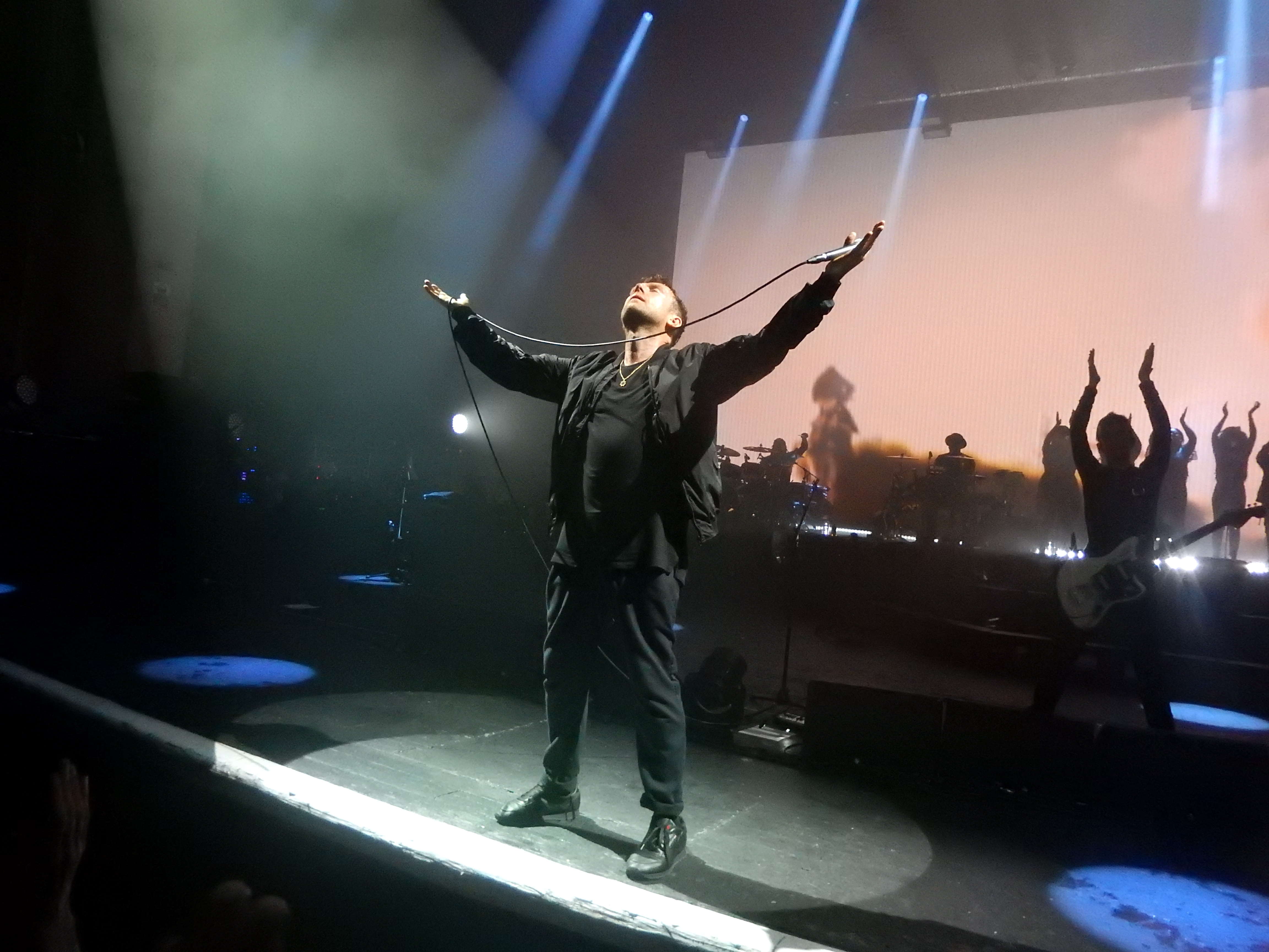 Gorillaz, Brixton Academy, London